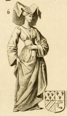 Margaret of Burgundy (1441)